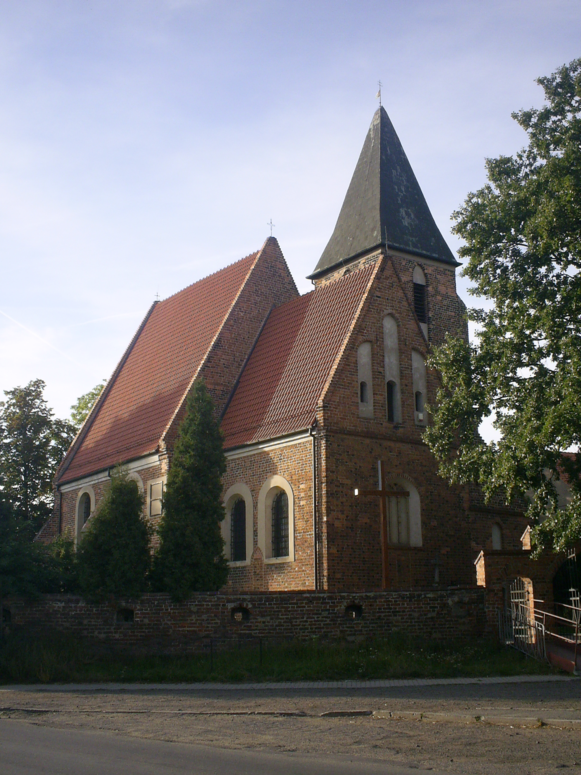 Jaszkotle - kościół parafialny pw. Wniebowstąpienia Pana Jezusa, widok od frontu (zabytek nr A/1198/1250 z dn. 1965-03-05)